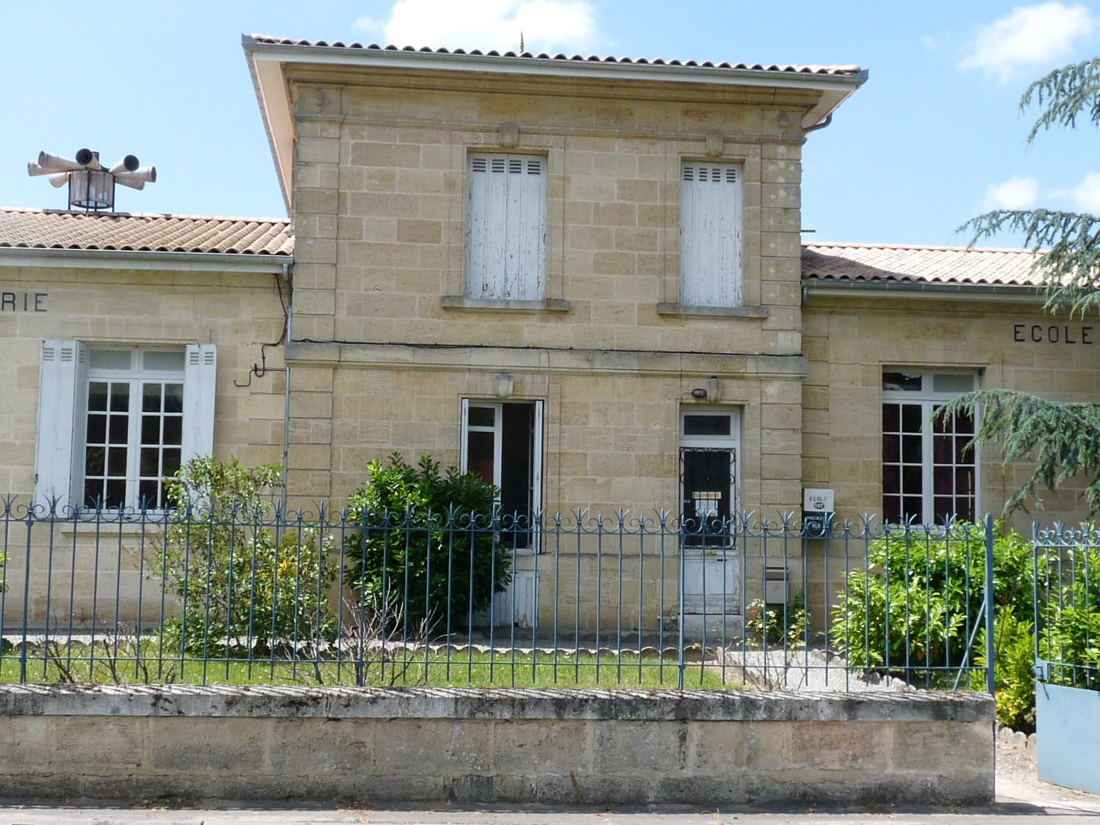 Mairie de Virsac, Gironde, France